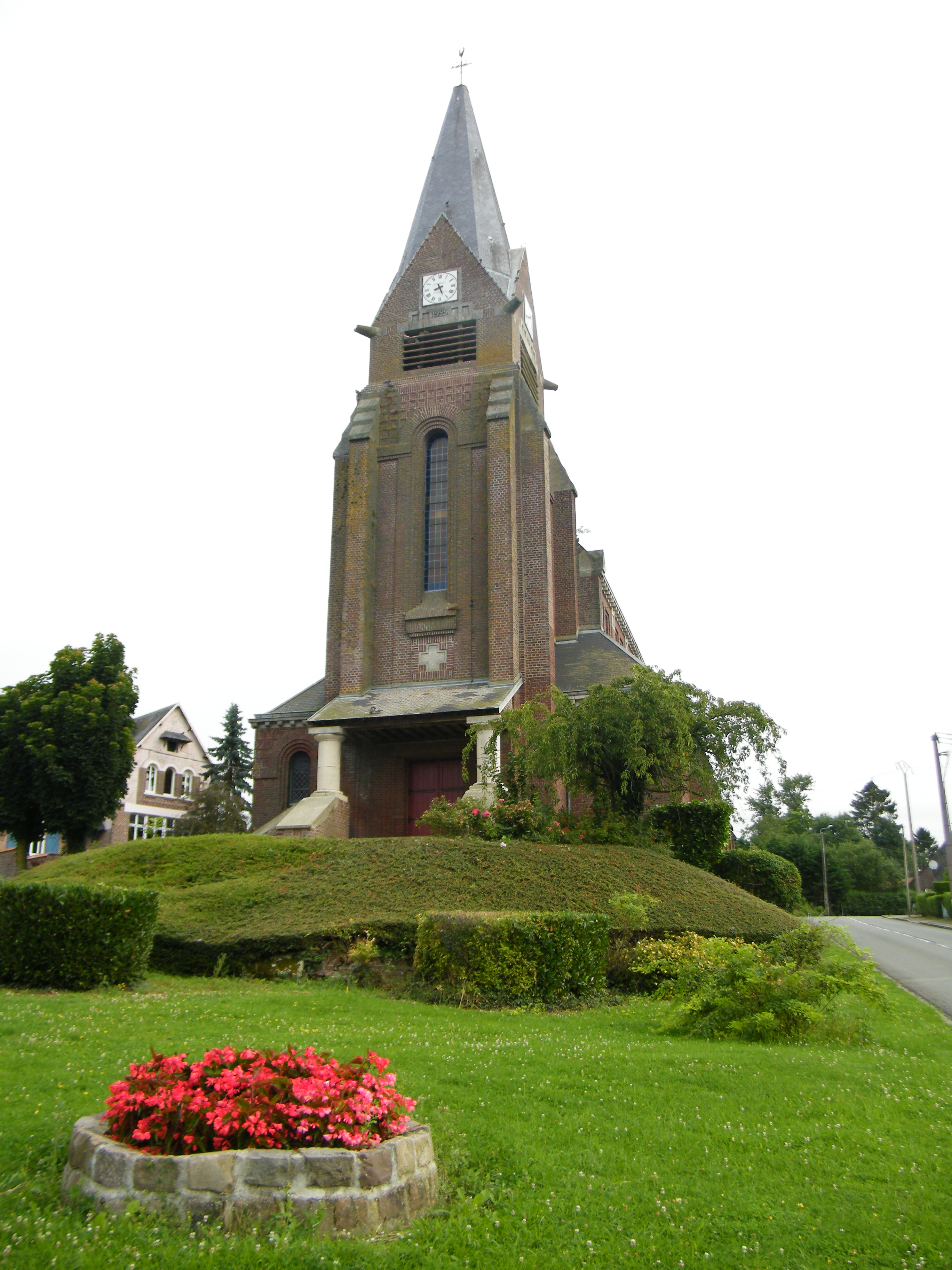 Eglise.